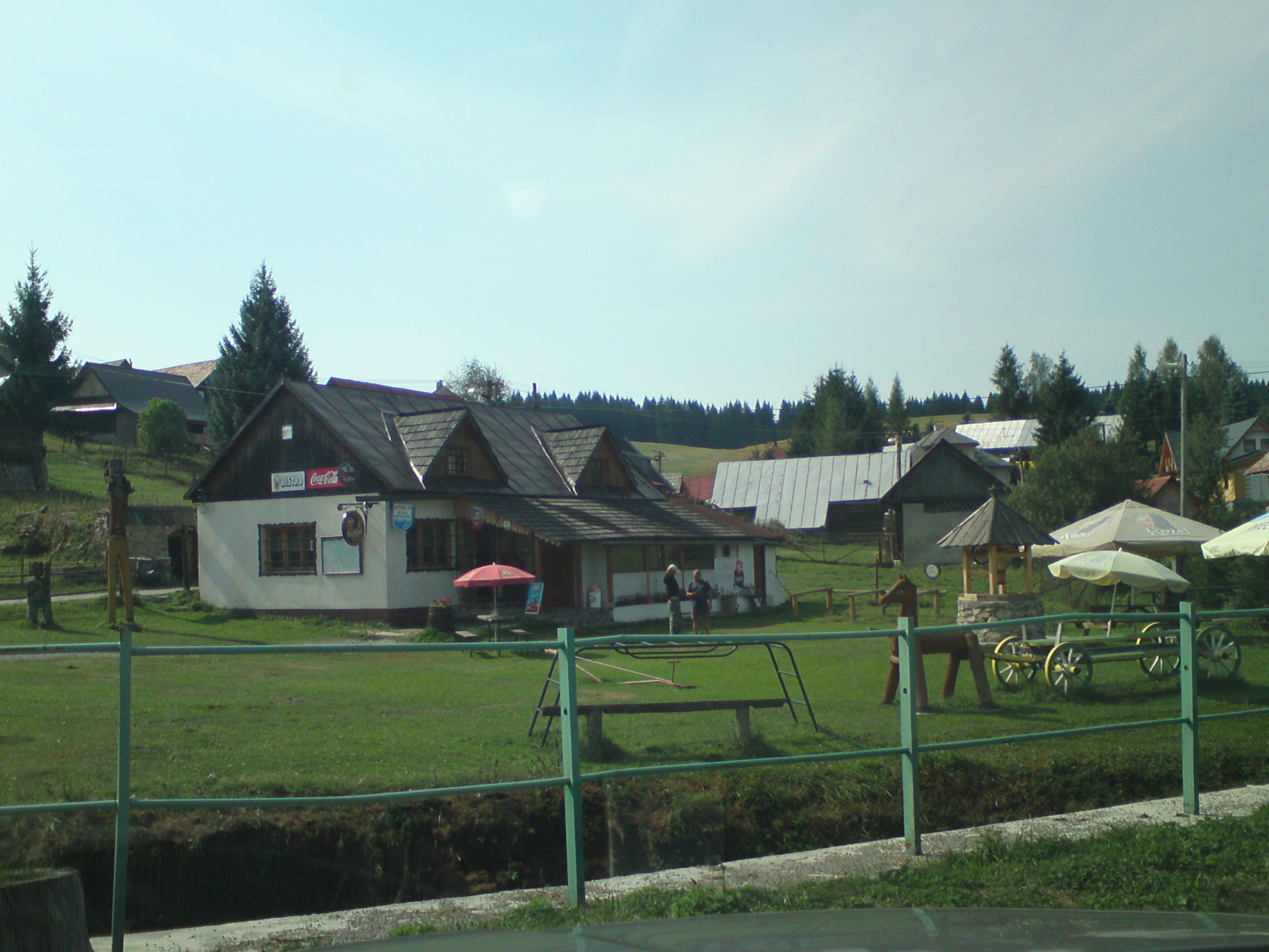 Centrum obce